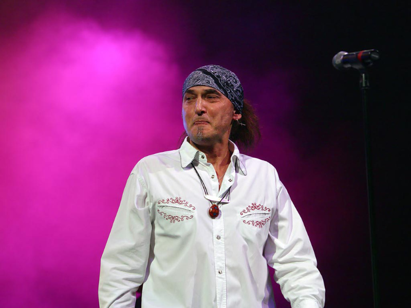 Mr. Basary az Egy csepp emberség Székelyföldért koncerten. Papp László Budapest Sportaréna.